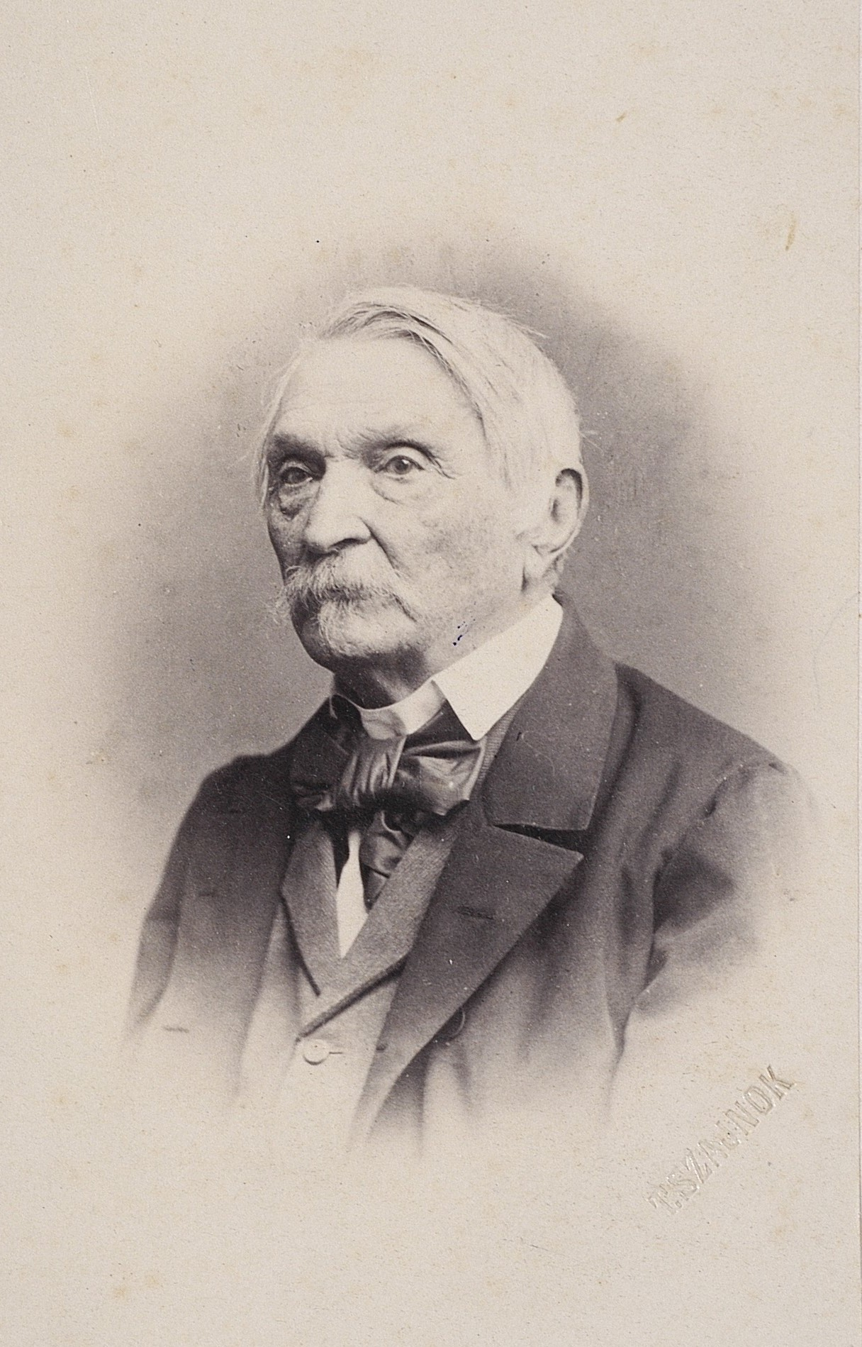 fotografia